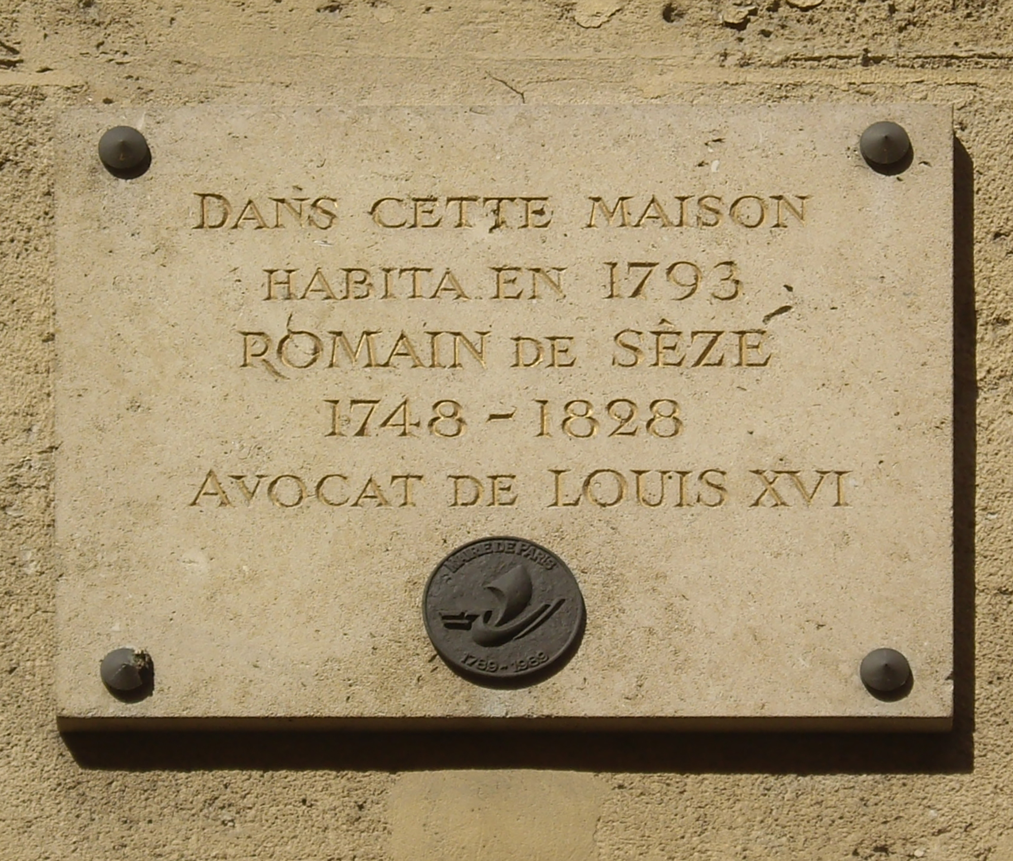 Plaque apposée au n° 20 de la rue des Quatre-Fils, Paris 3e. « Dans cette maison habita en 1793 Romain de Sèze, 1748-1828, avocat de Louis XVI. » [Variantes de Romain de Sèze : Romain Desèze, Raymond Desèze, Raymond de Sèze.]